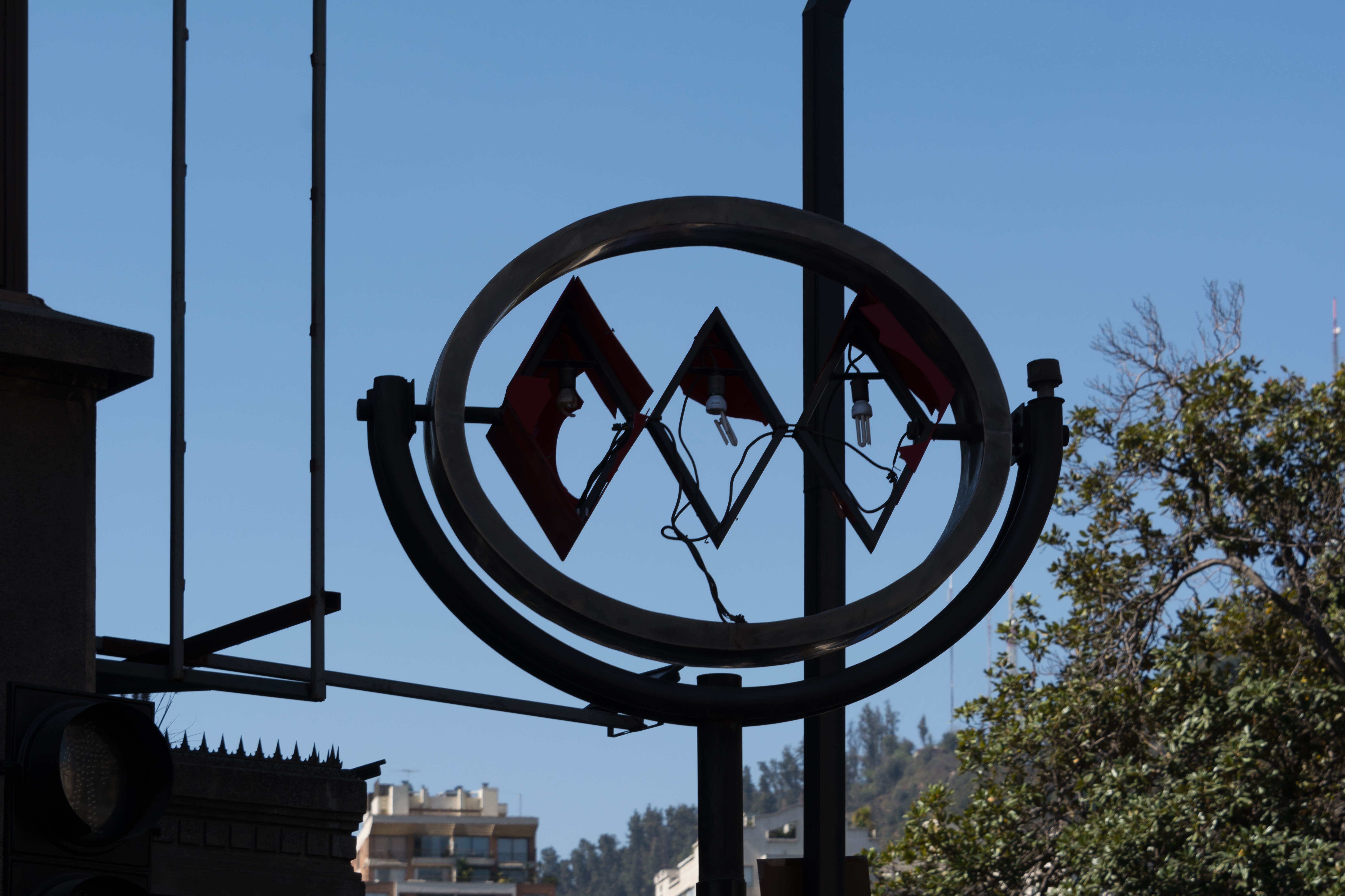 Protestas en Chile de 2019, Estación Bellas Artes, Santiago, Chile